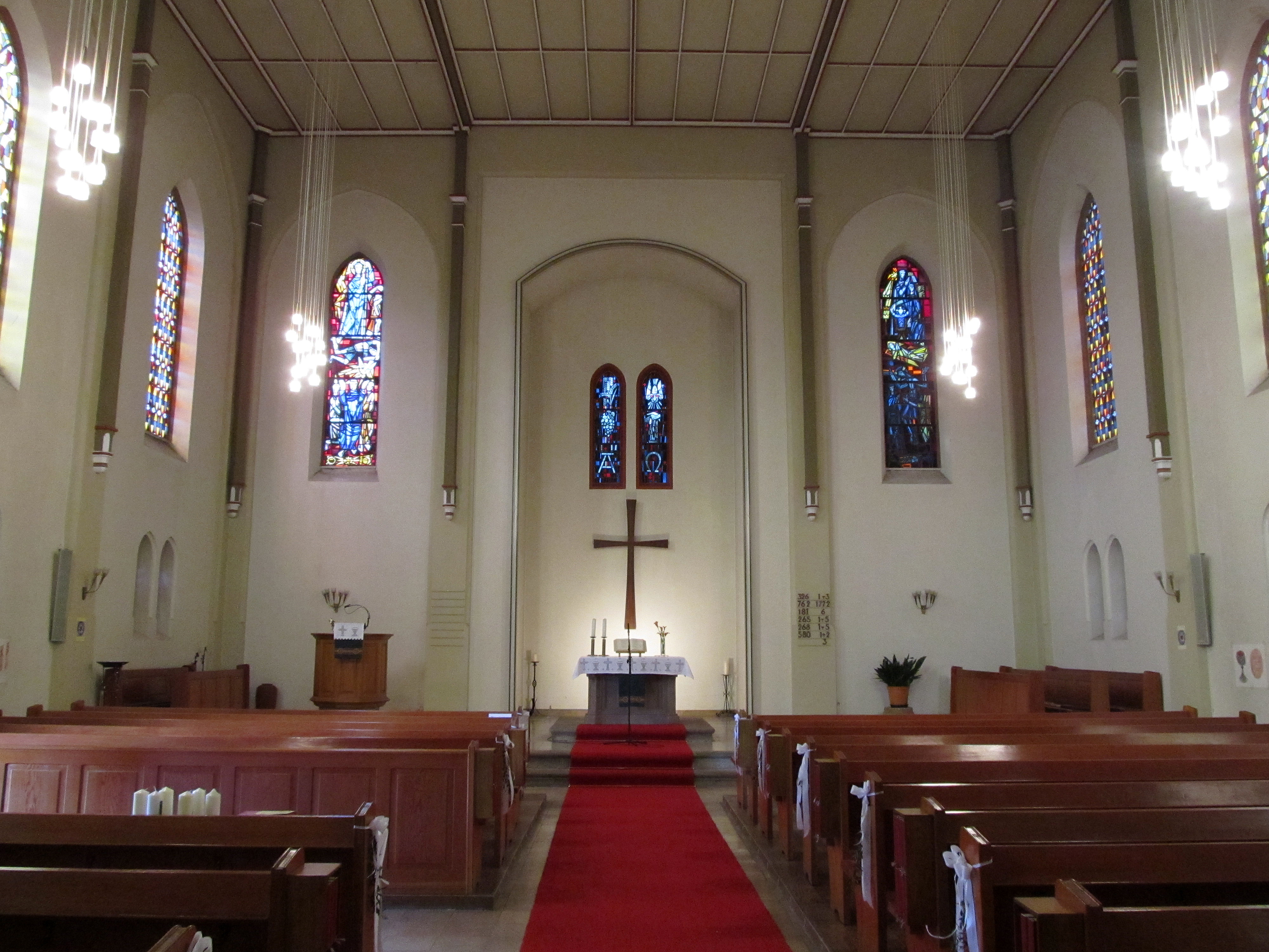 Blick ins Innere der protestantischen Martin-Luther-Kirche in Webenheim, einem Stadtteil von Blieskastel, Saarland